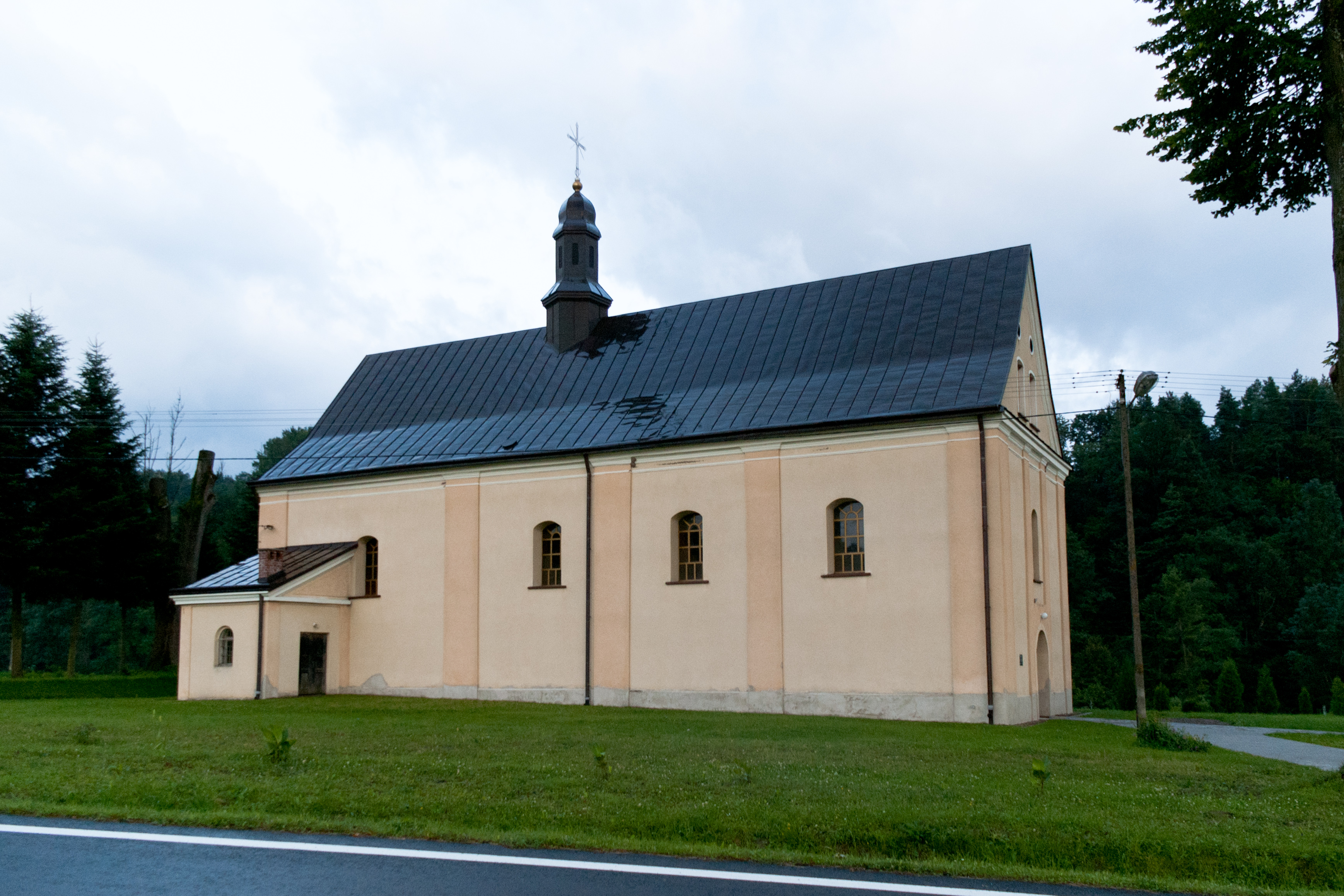 Kościół parafialny pw. świętych Kosmy i Damiana w Wujskich